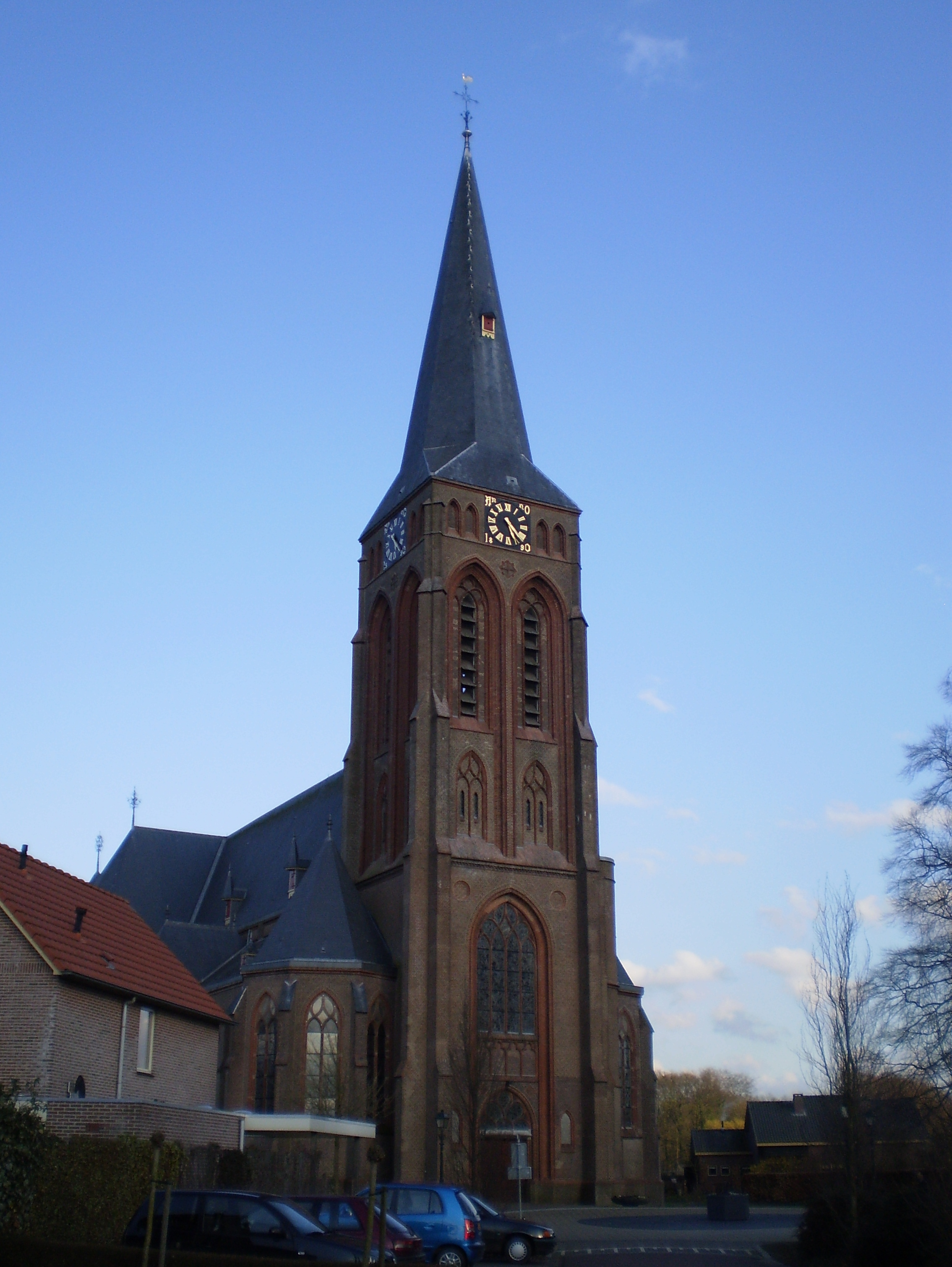 St. Martinuskerk, Baak